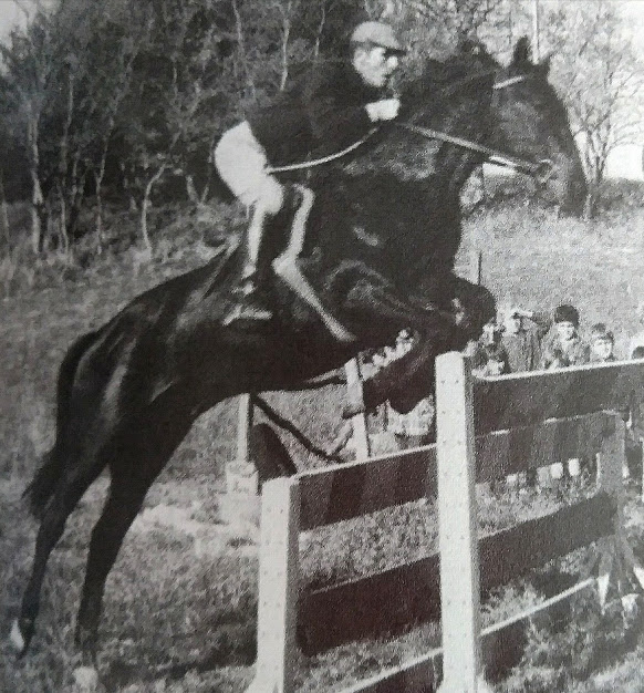 Louis Délieux sur Lutteur B (furioso) en 1963 dans sa carrière d'entraînement du Plapé devant une classe de primaire du village d'Endoufielle (32)